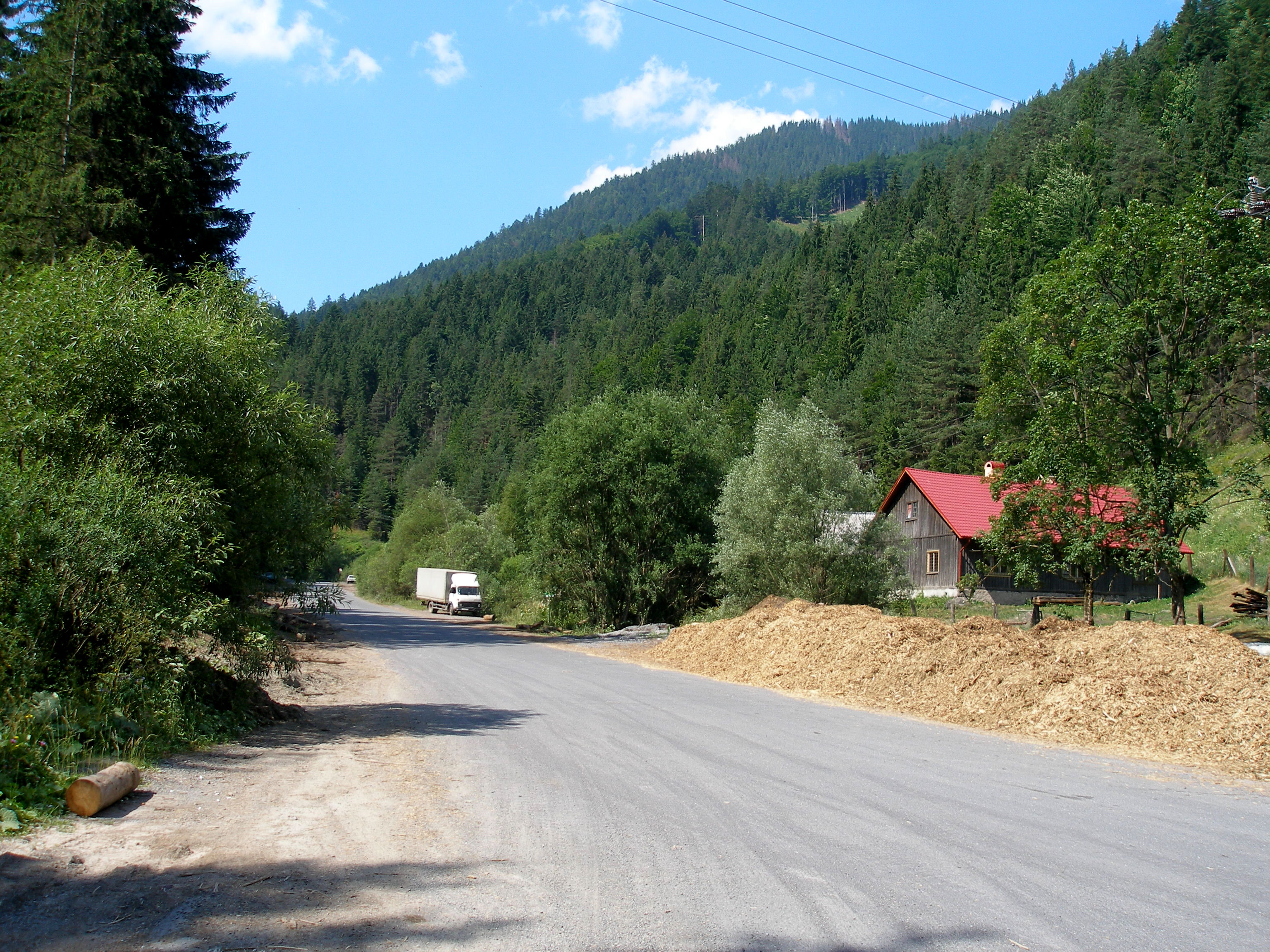 Obec Malužiná. Okres Liptovský Mikuláš.